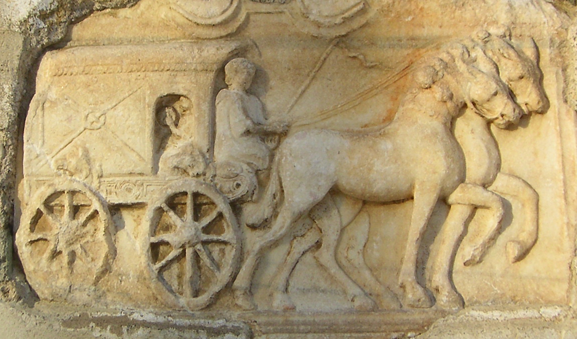 Römisches Steinrelief zeigt eine "Seele" auf der Reise in Jenseits, kutschiert von der mytologischen keltischen Figur Genius Cucullatus , eingemauert im Dom von Maria Saal, selbst fotografiert